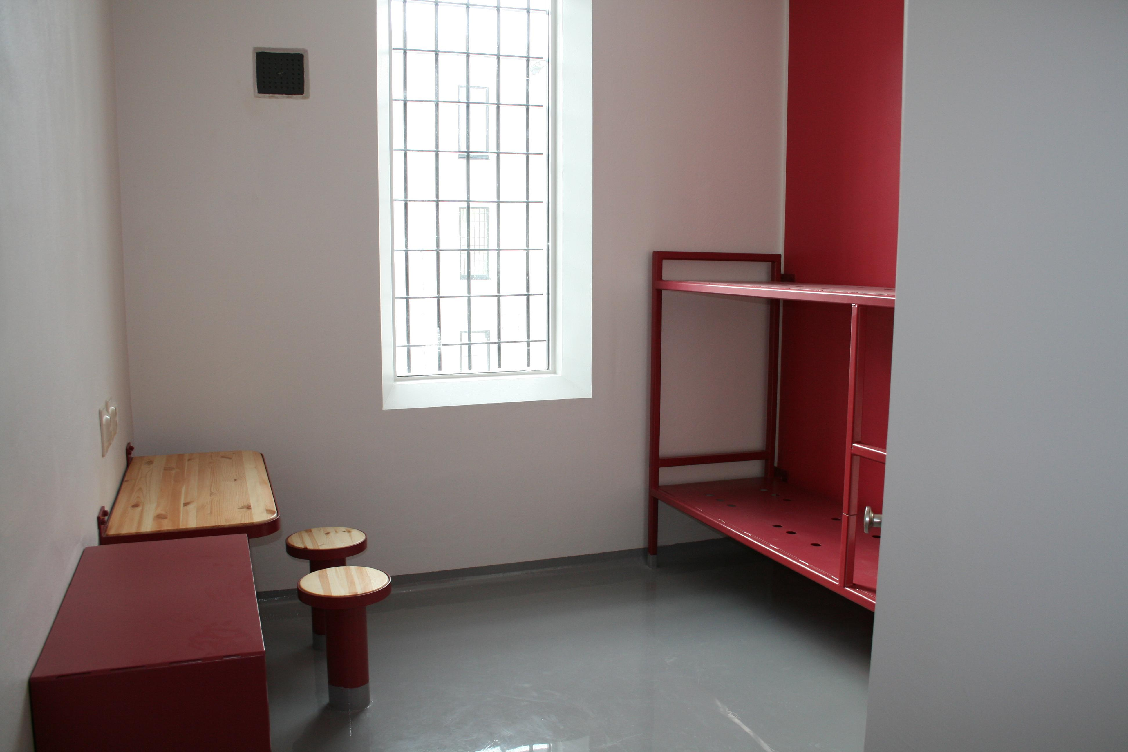 Viru Prison, Estonia